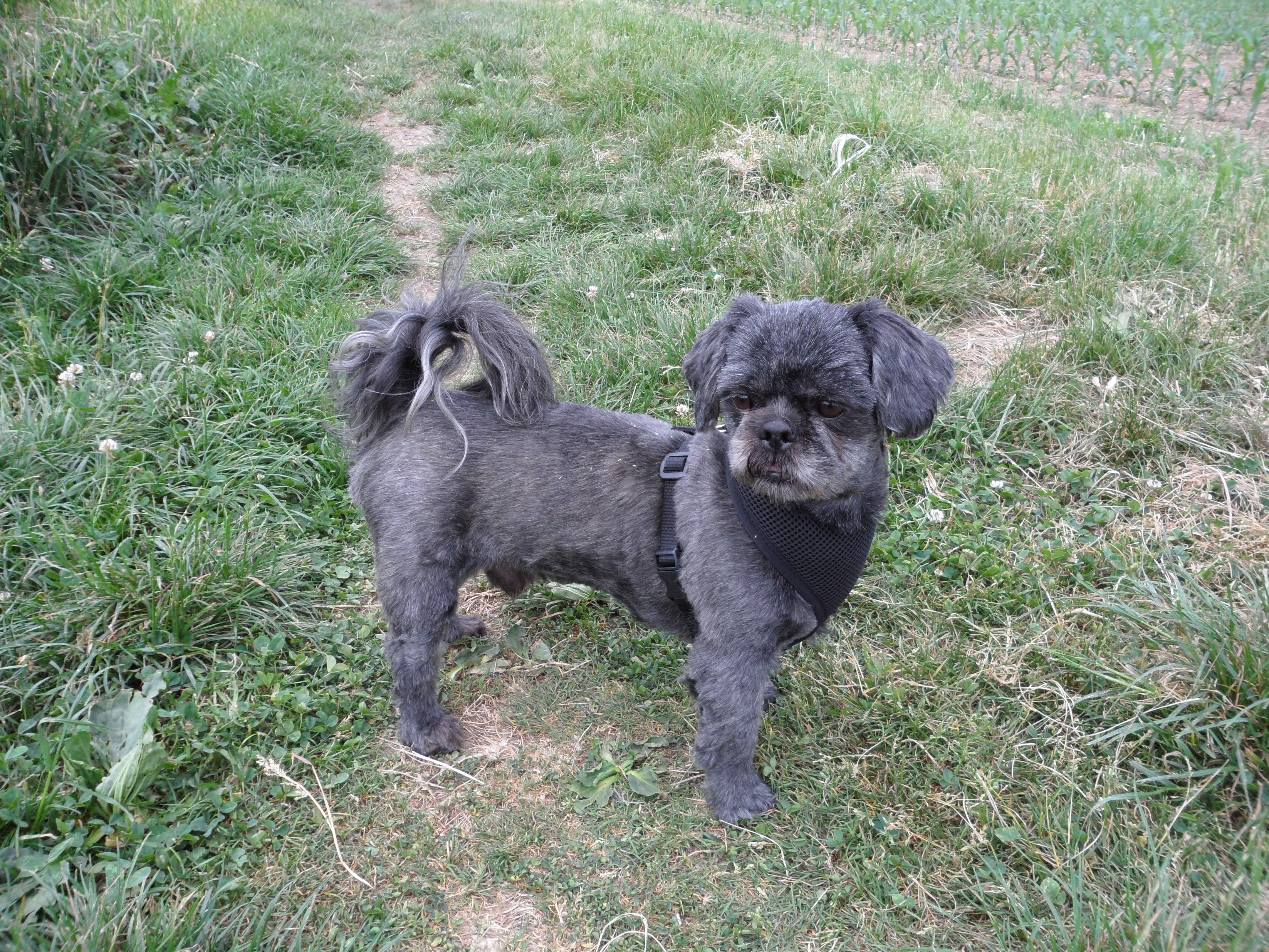 Shih Tzu, reinrassig, geschoren